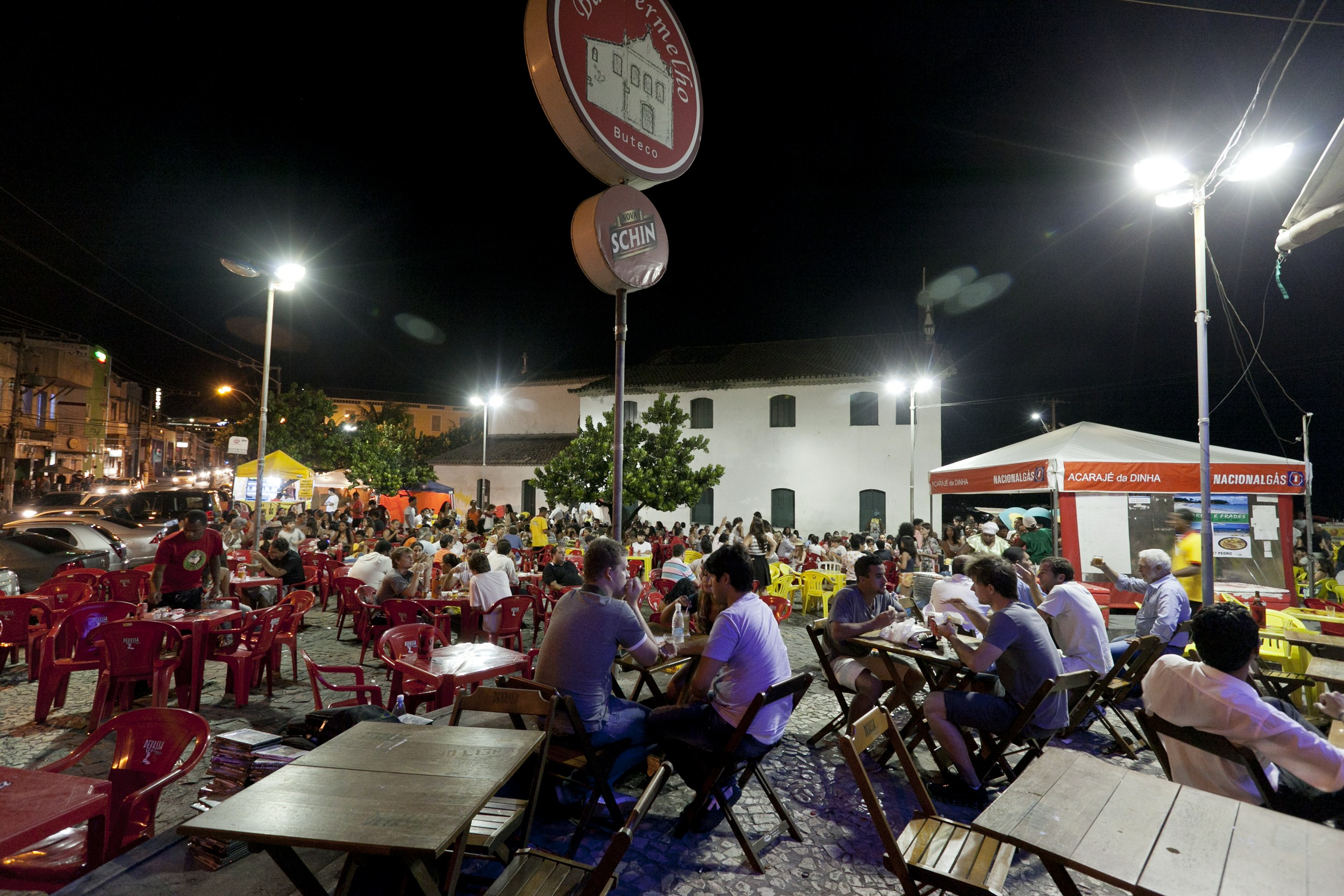 Acarajé da Dinha, no bairro soteropolitano boêmio do Rio Vermelho.